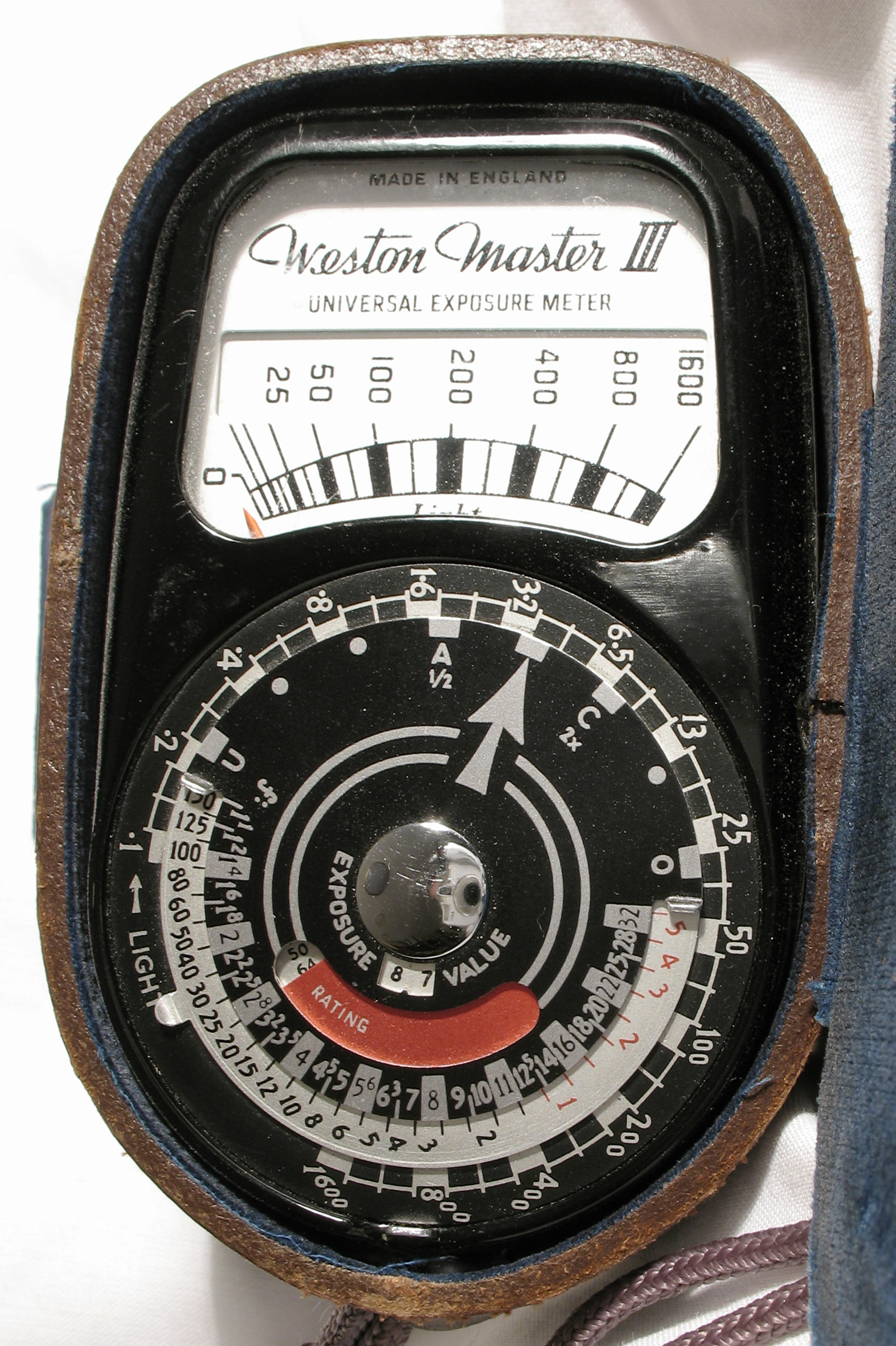 Selenium cell light meter